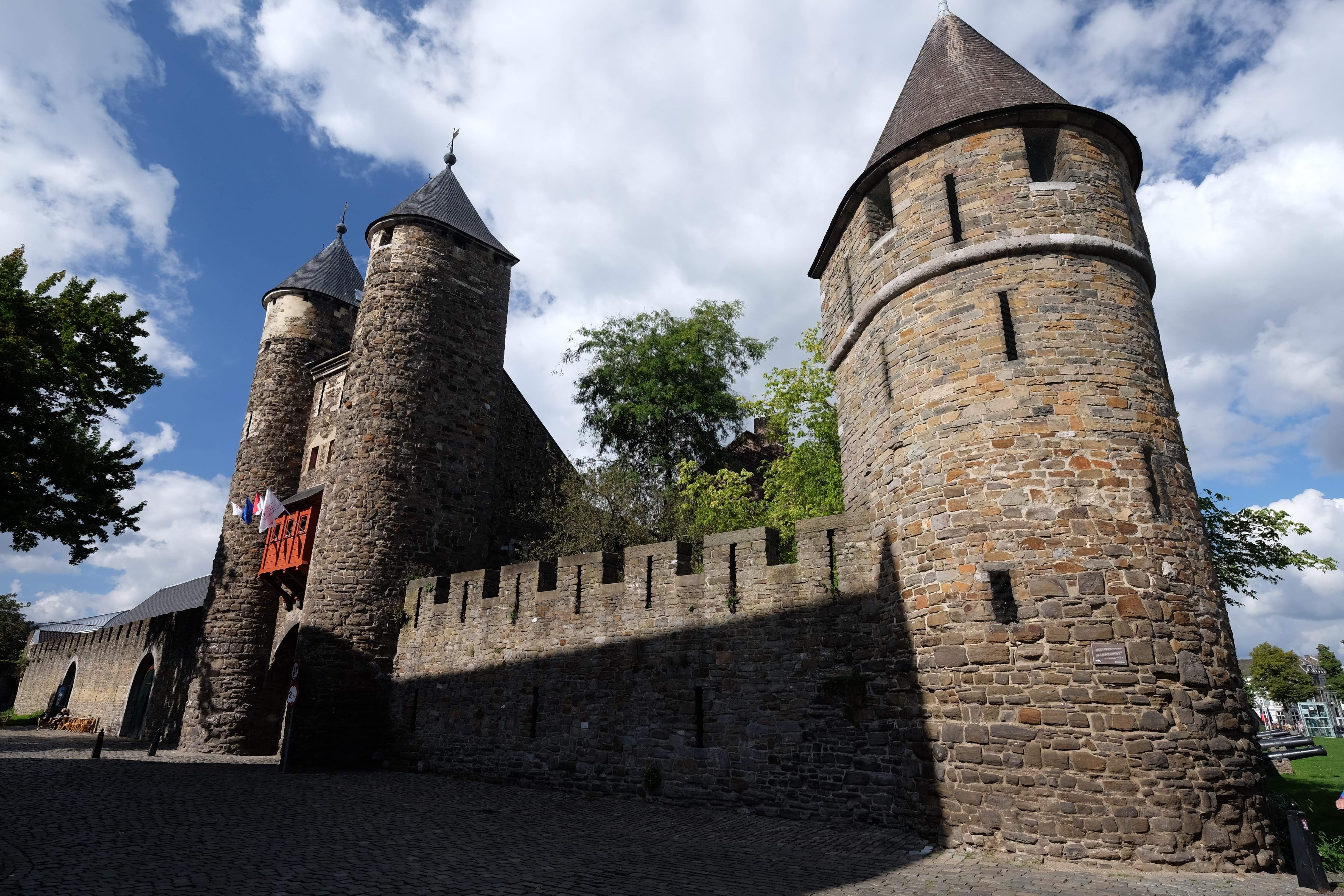 Jekerkwartier, 6211 Maastricht, Netherlands